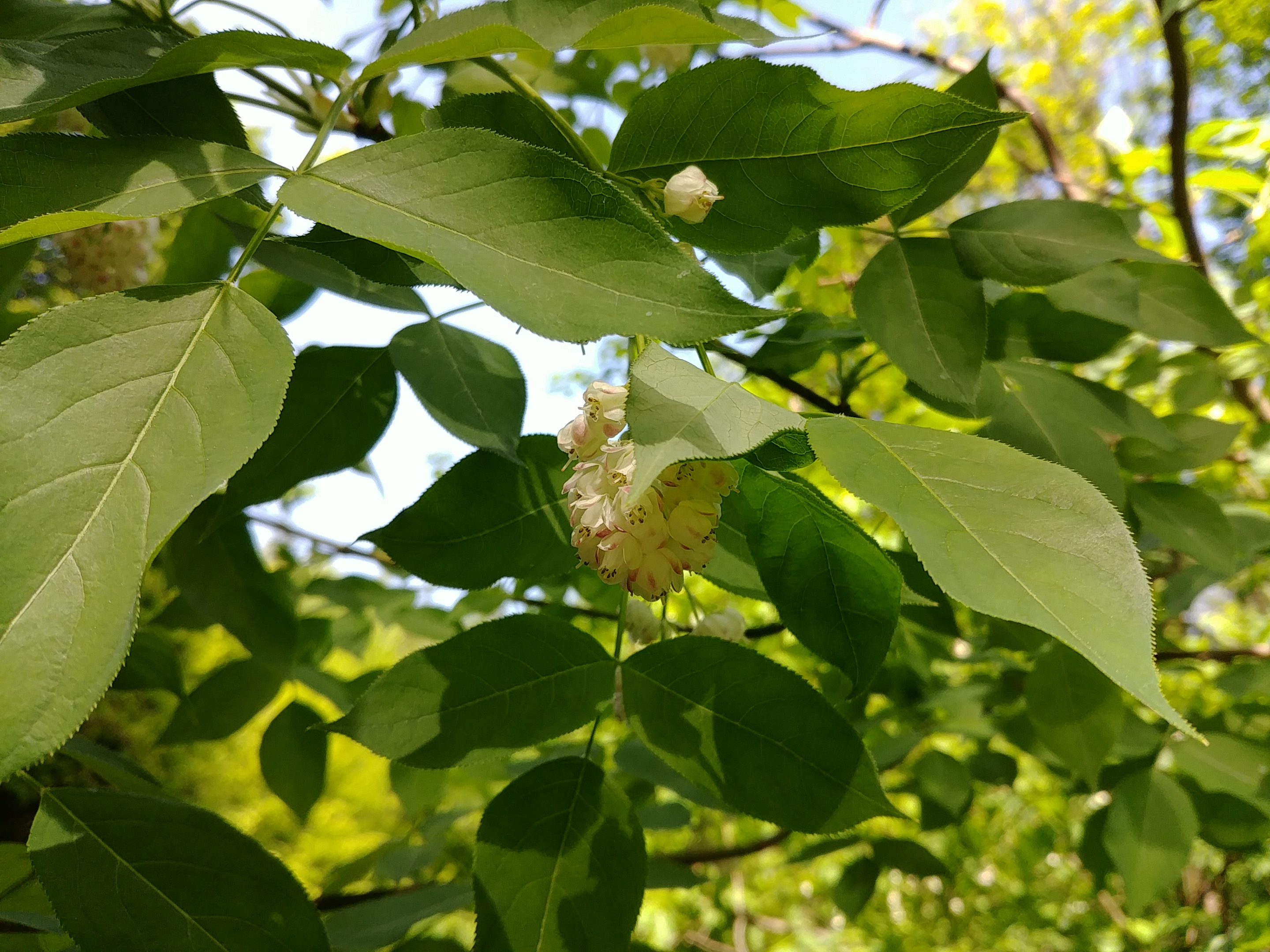 Kłokoczka południowa - północny zasięg występowania. Rezerwat Kamera.